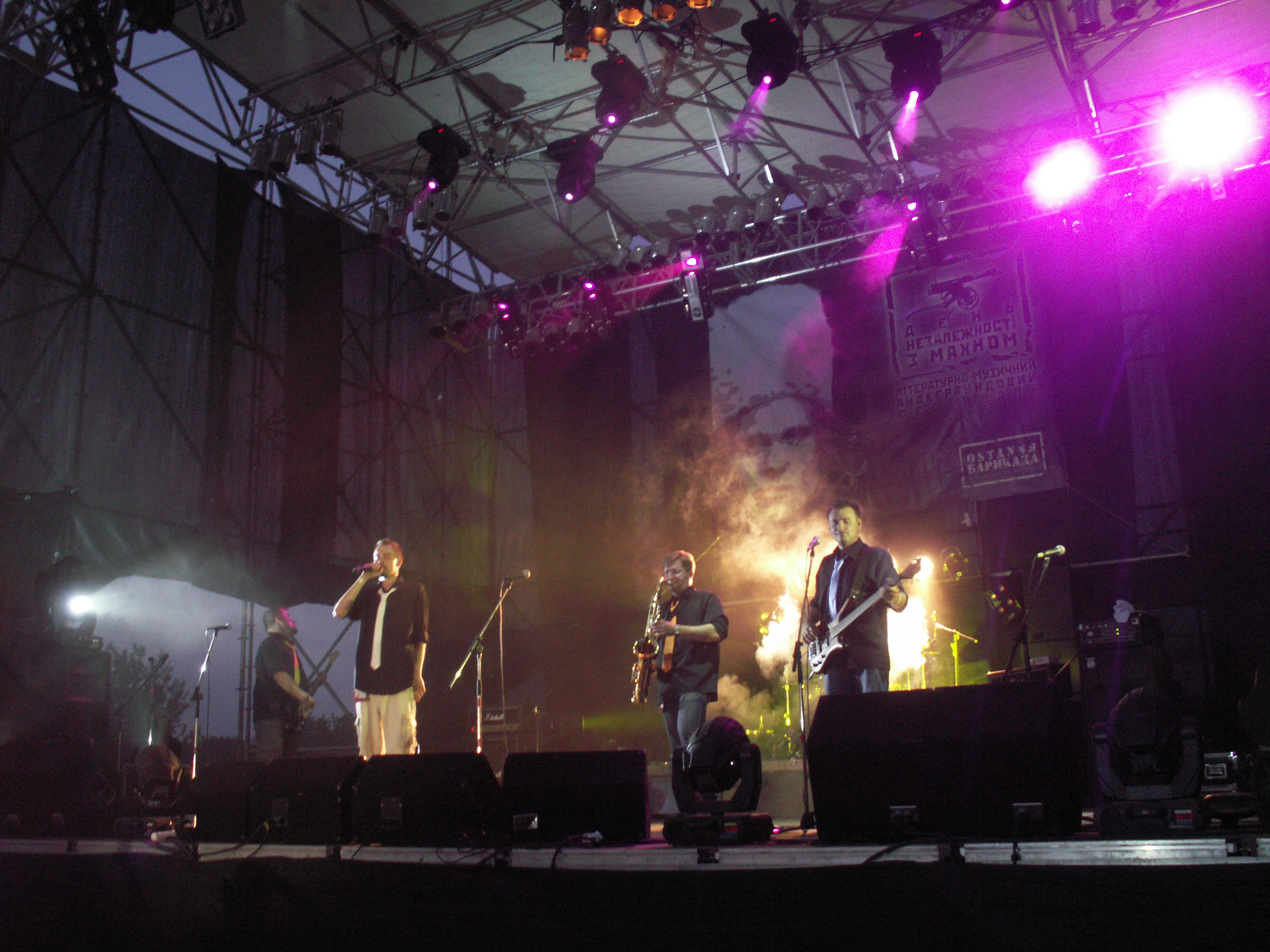 Беларуская (тарашкевіца): Выступ IQ48 у Гуляйполі, Украіна